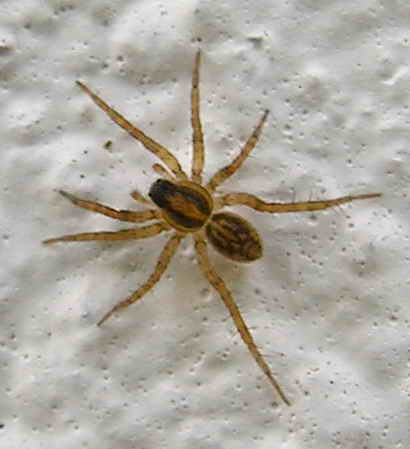 Foto tirada cunha Nikon E8800 Bastabales - Galicia - Spain